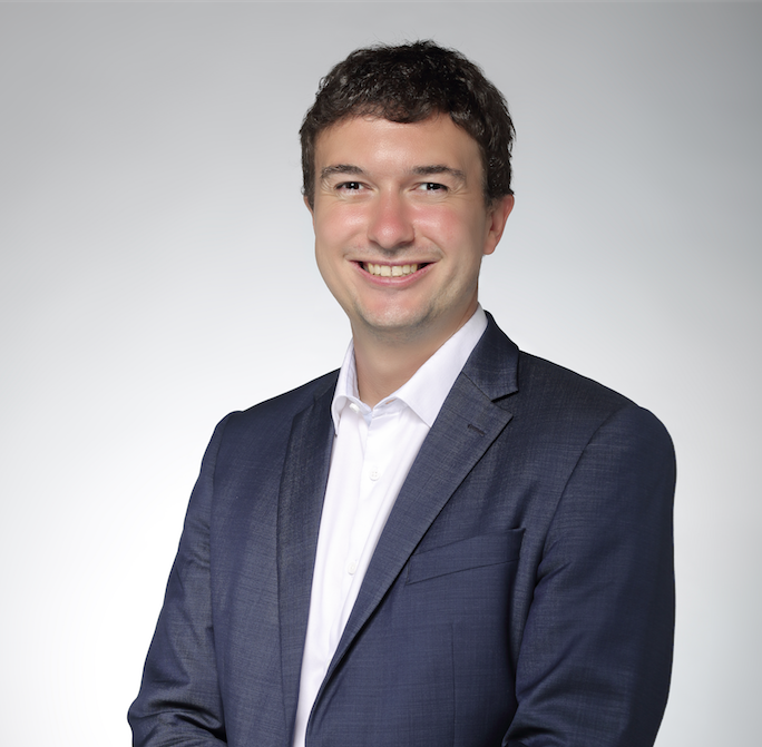 Lukáš Kaucký v roce 2017